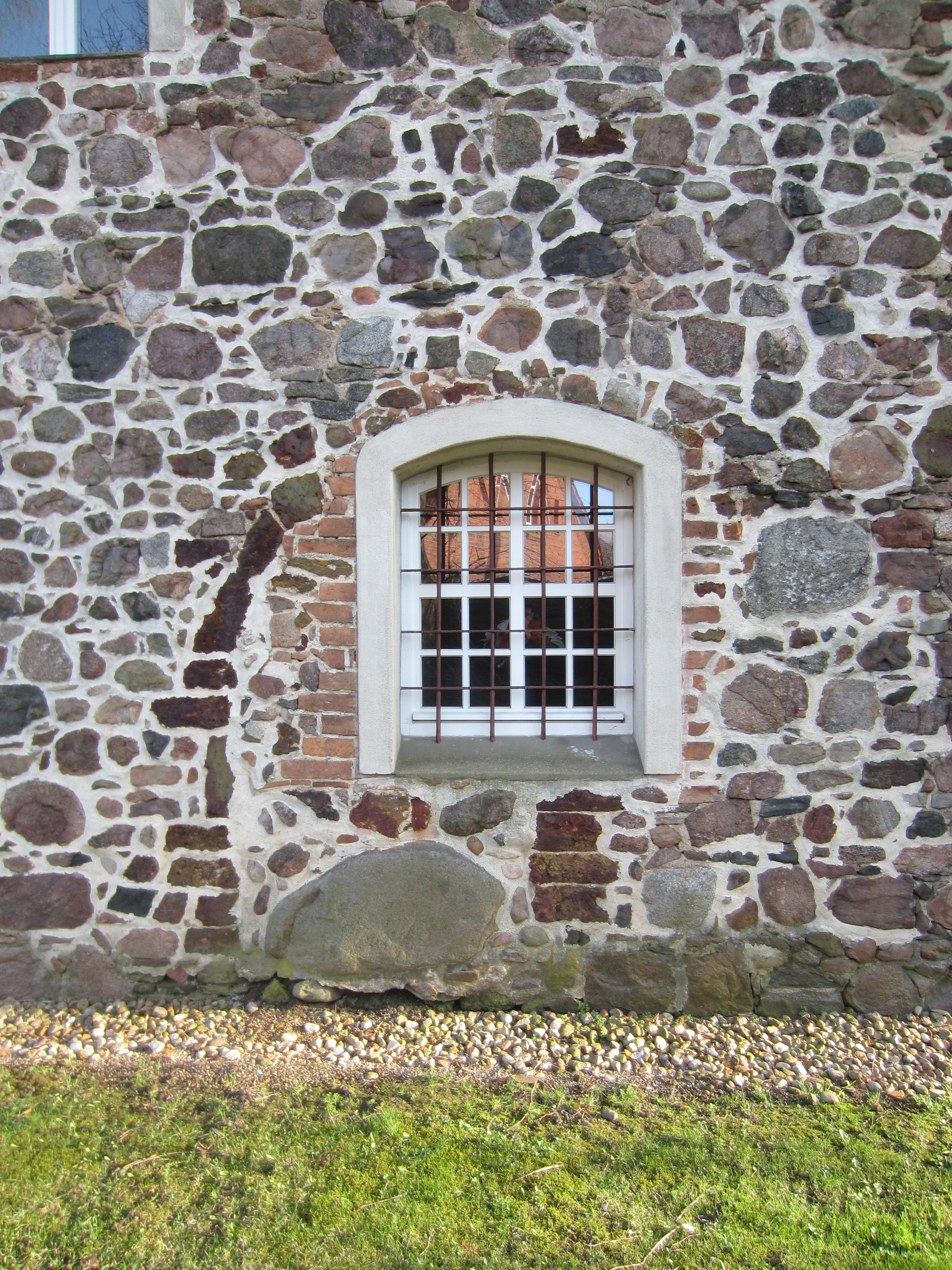 Rosenthal, Stadt Dahme/Mark, denkmalgeschützte Dorfkirche, Nordfassade mit ehemaligem Portal